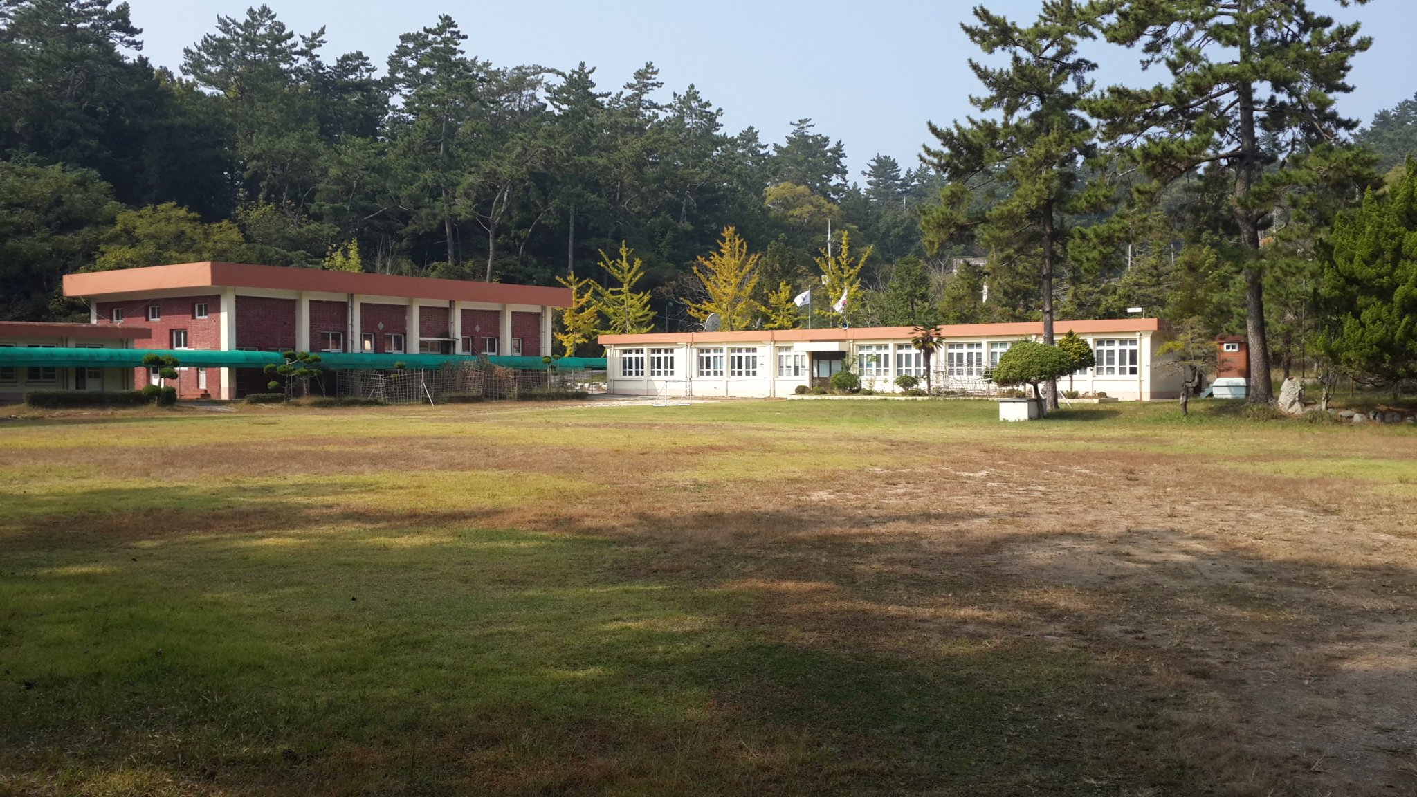 소록도에 있는 학교